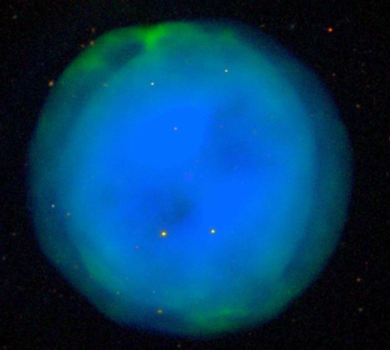 Öökulli udu